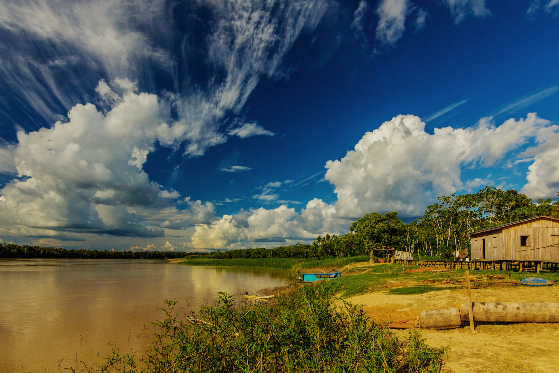 Comunidade Ribeirinha, as margens do Médio Rio Juruá, próximo à cidade de Carauari - AM.